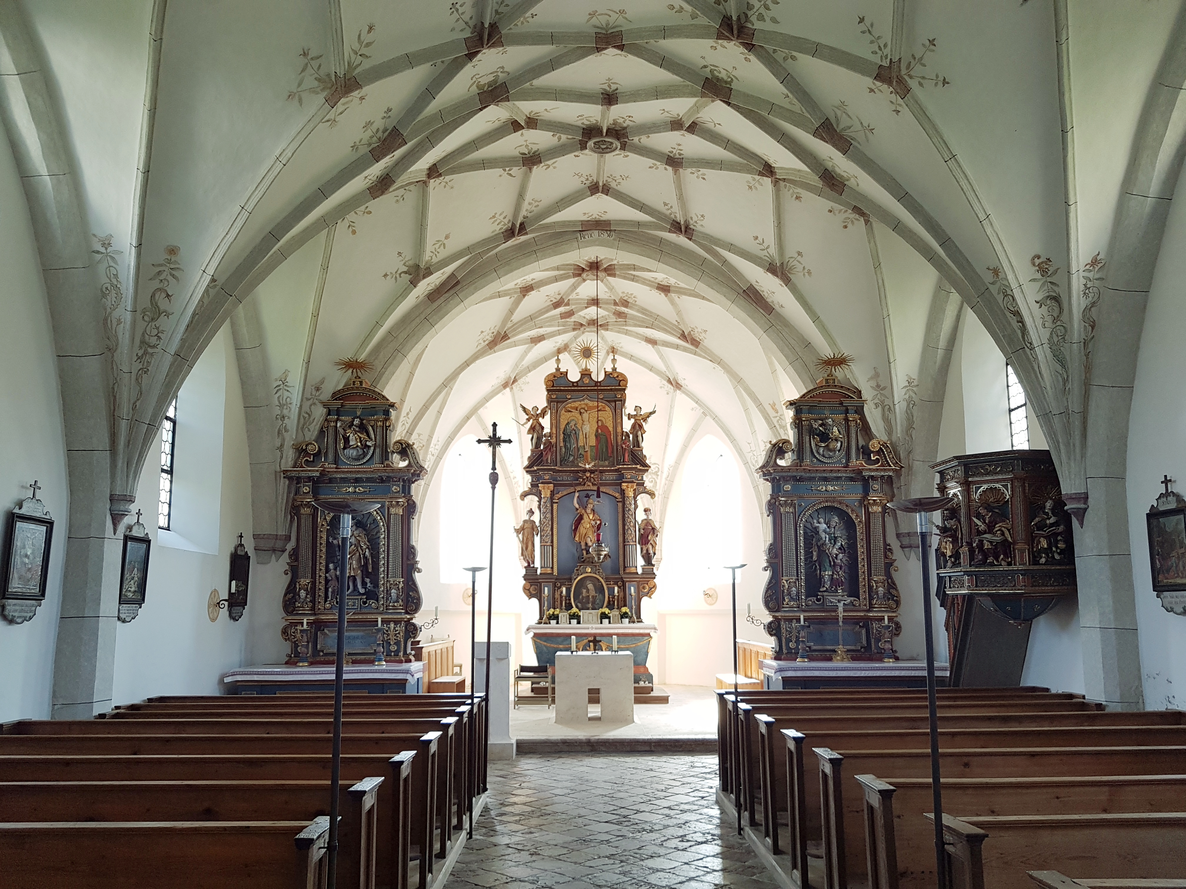 St. Georg (Georgenried), Innenraum mit Blick zum Chor